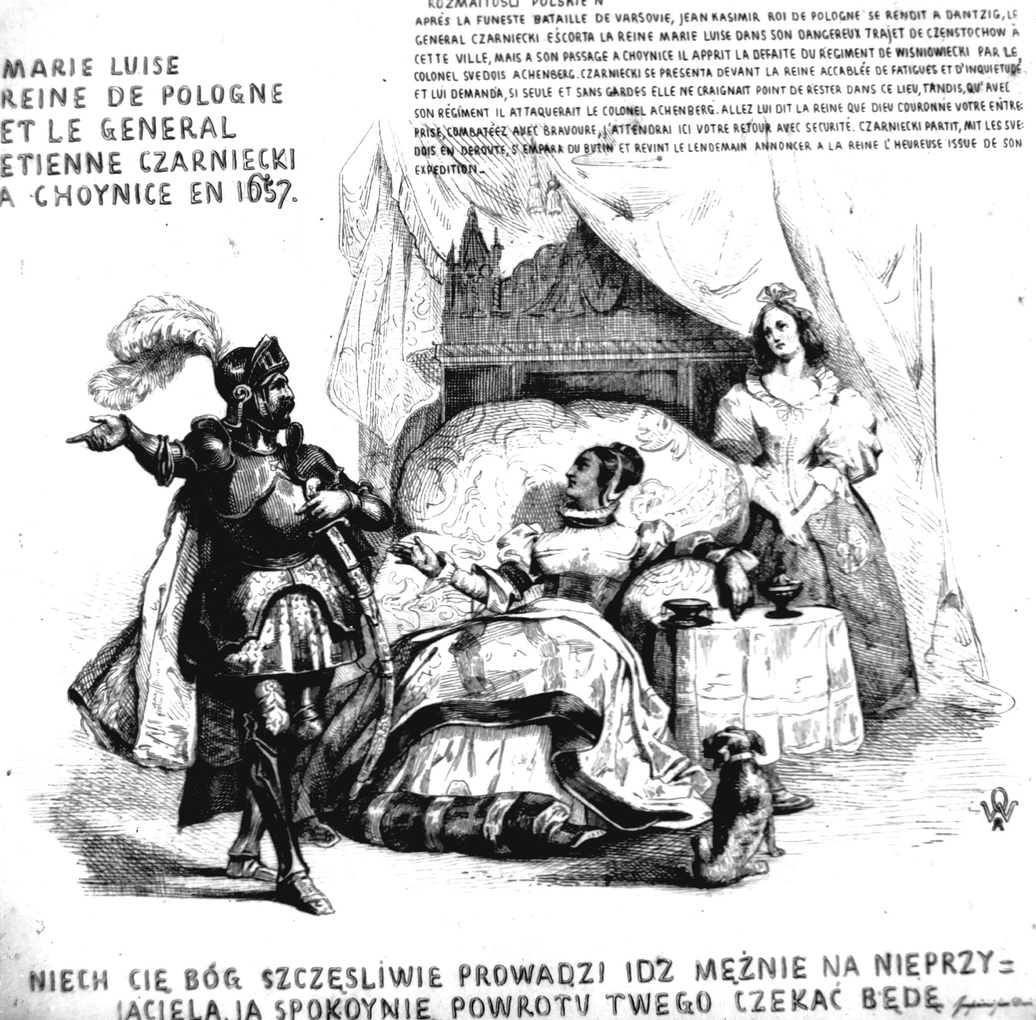 Maria Luisa Królowa Polski i generał Stefan Czarnecki w Chojnicach w 1657 r.